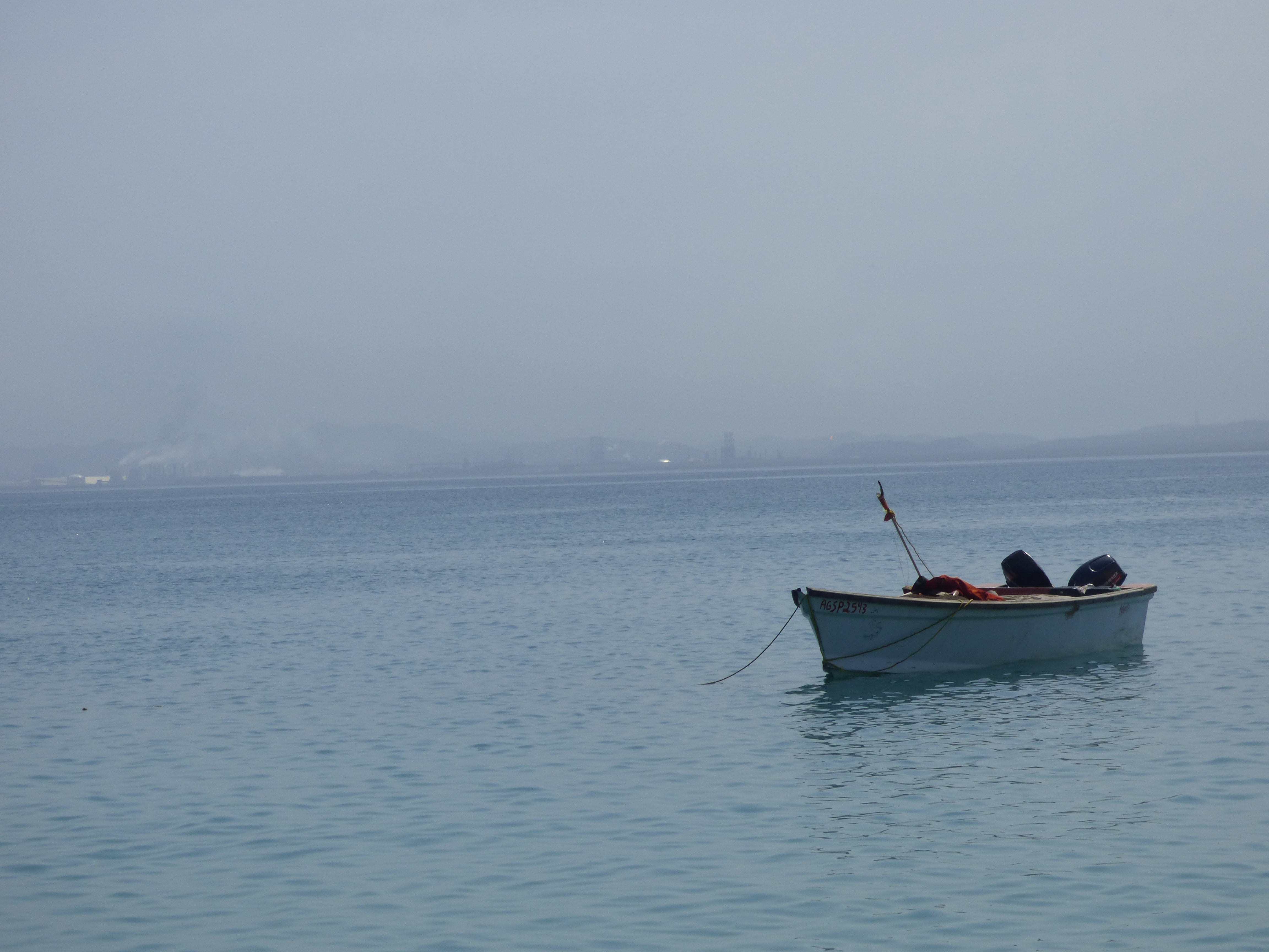 Peñero anclado cerca de la isla, al fondo logra verse el Complejo Industrial José Antonio Anzoátegui.